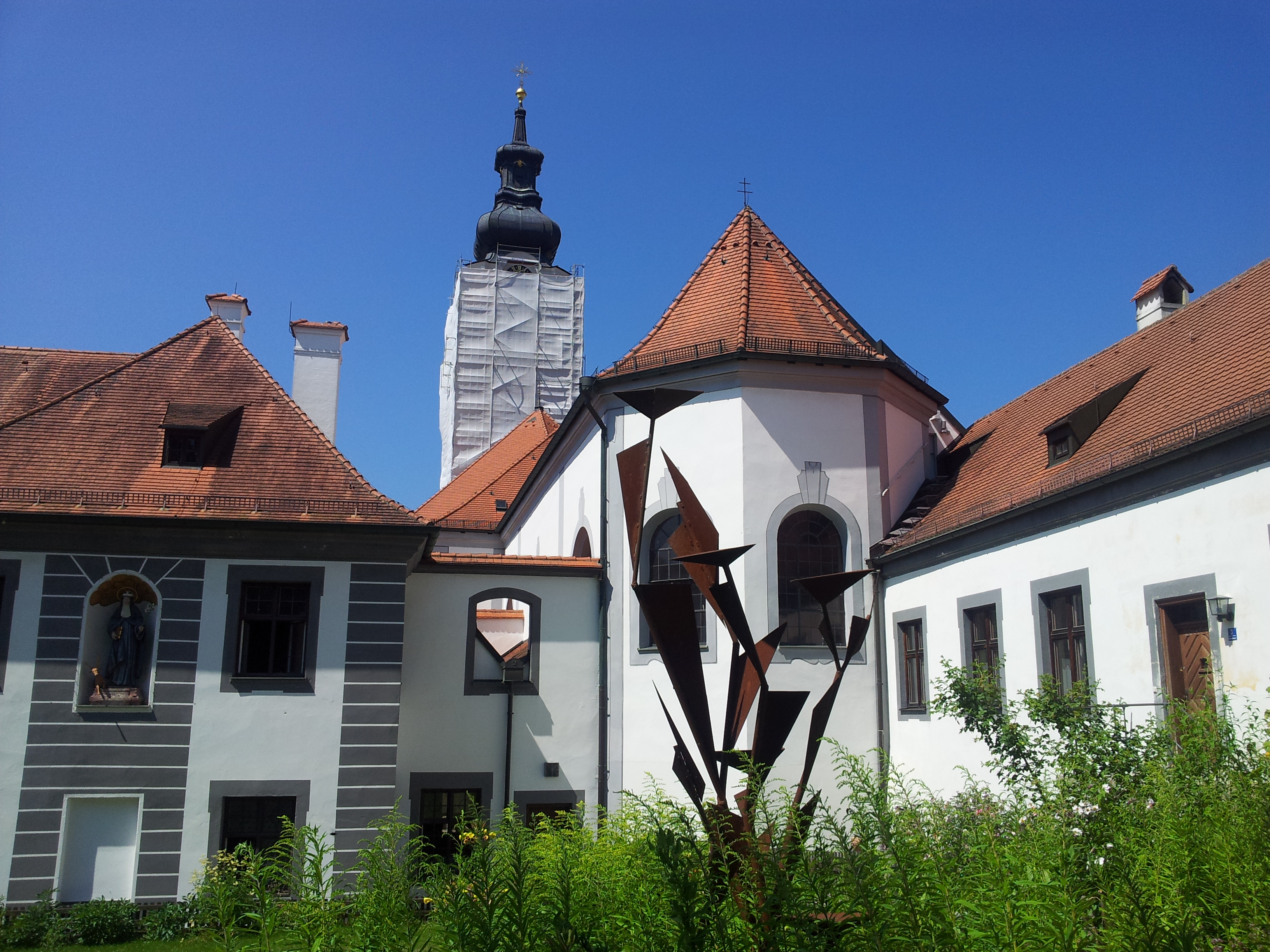 Birgittenkloster Altomünster (Ostseite mit Birgitten-Statue)